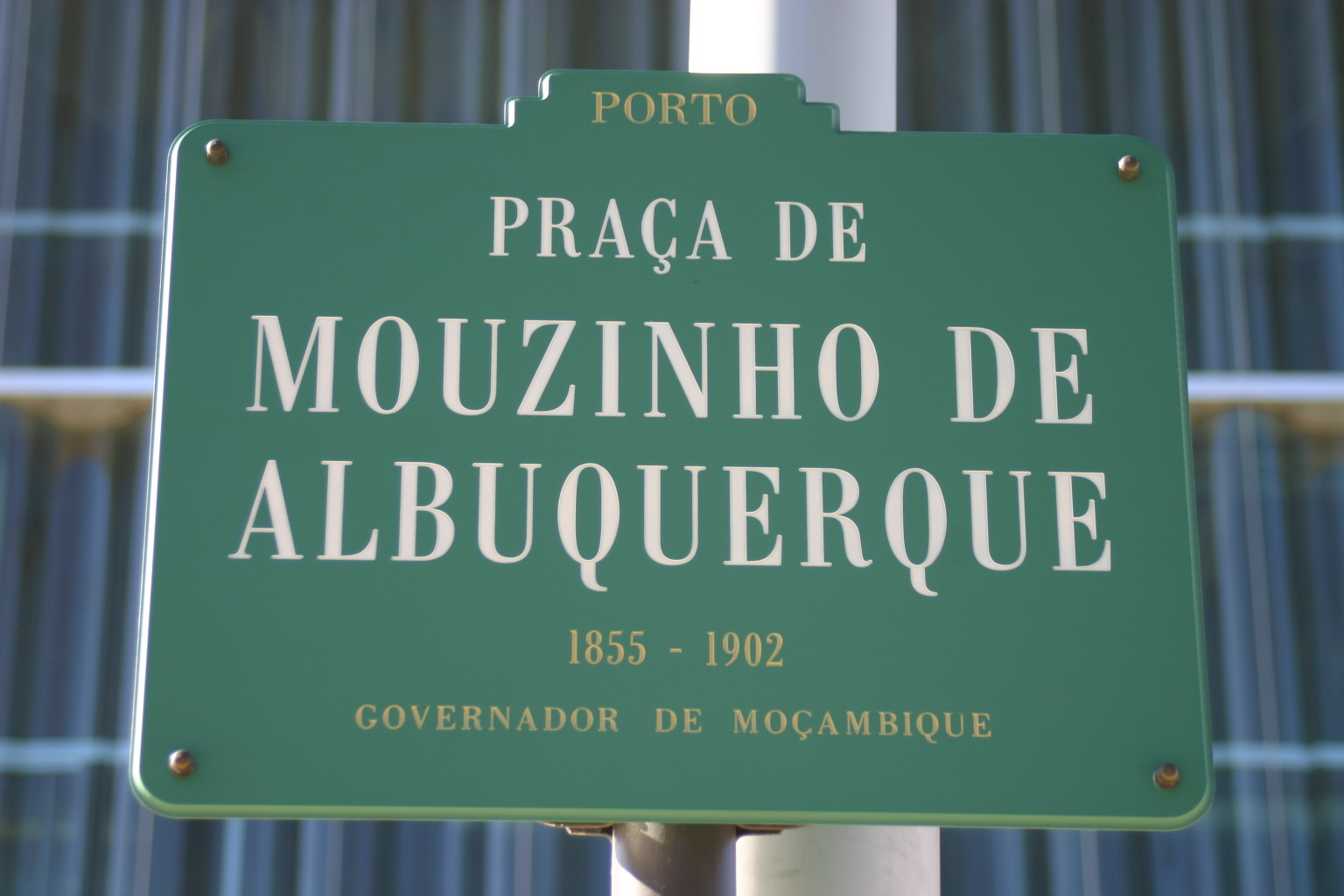 Placa toponímica da Praça Mouzinho de Albuquerque na cidade do Porto.